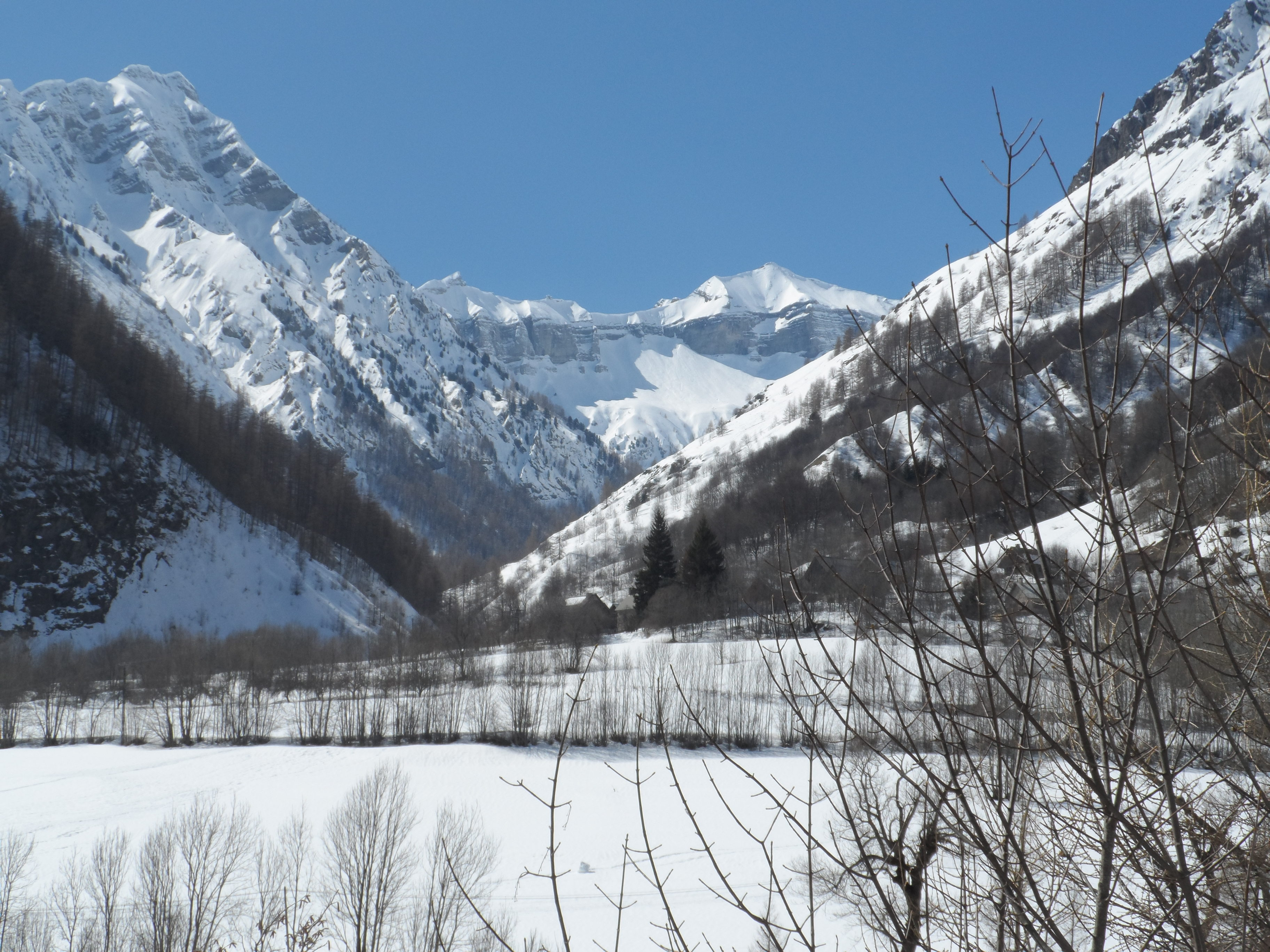 Les Fermonds, la vallée du Tourond et au fond le massif des Écrins